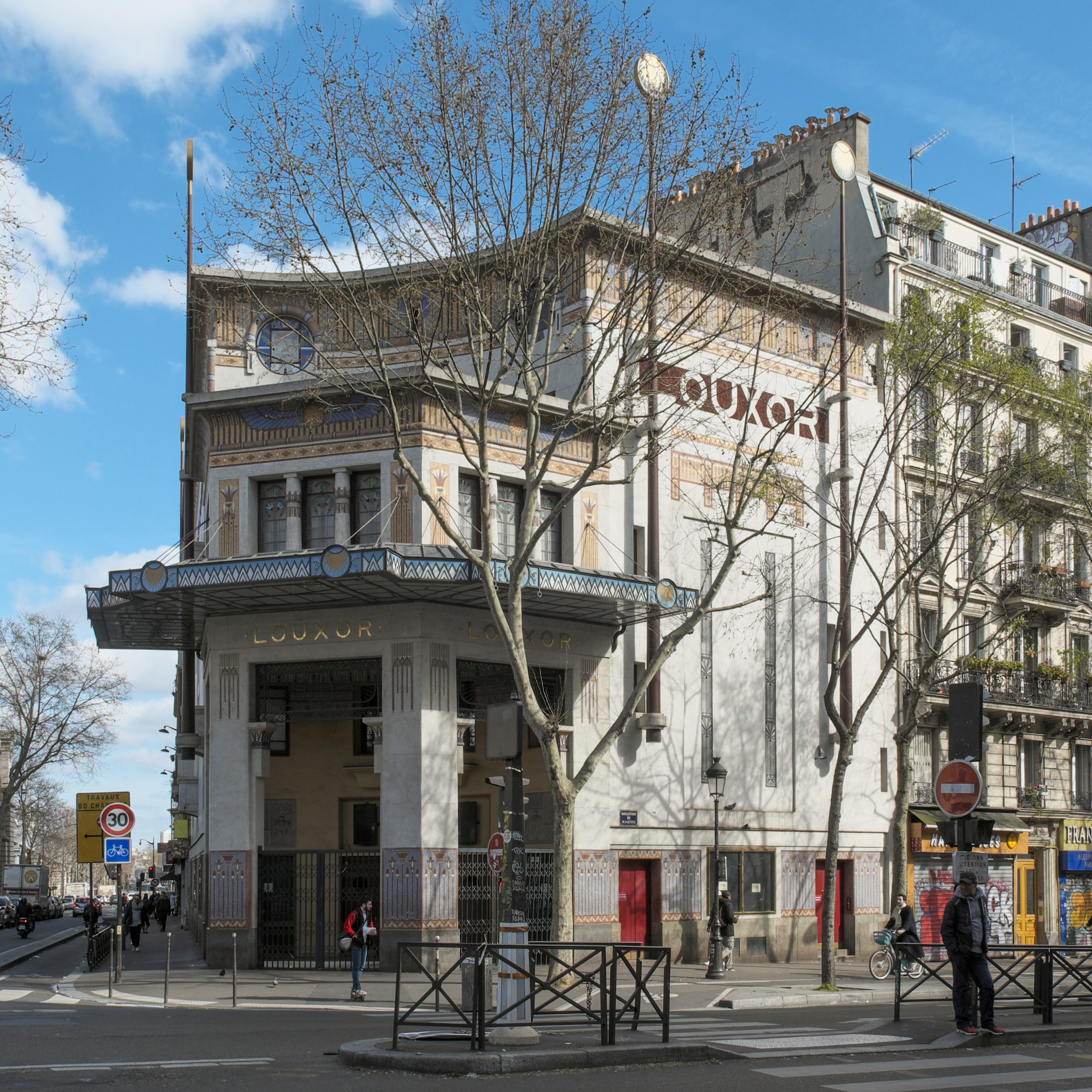 Kino Le Louxor, 170 boulevard Magenta/boulevard de la Chapelle, im 10. Arrondissement in Paris (Île-de-France/Frankreich)